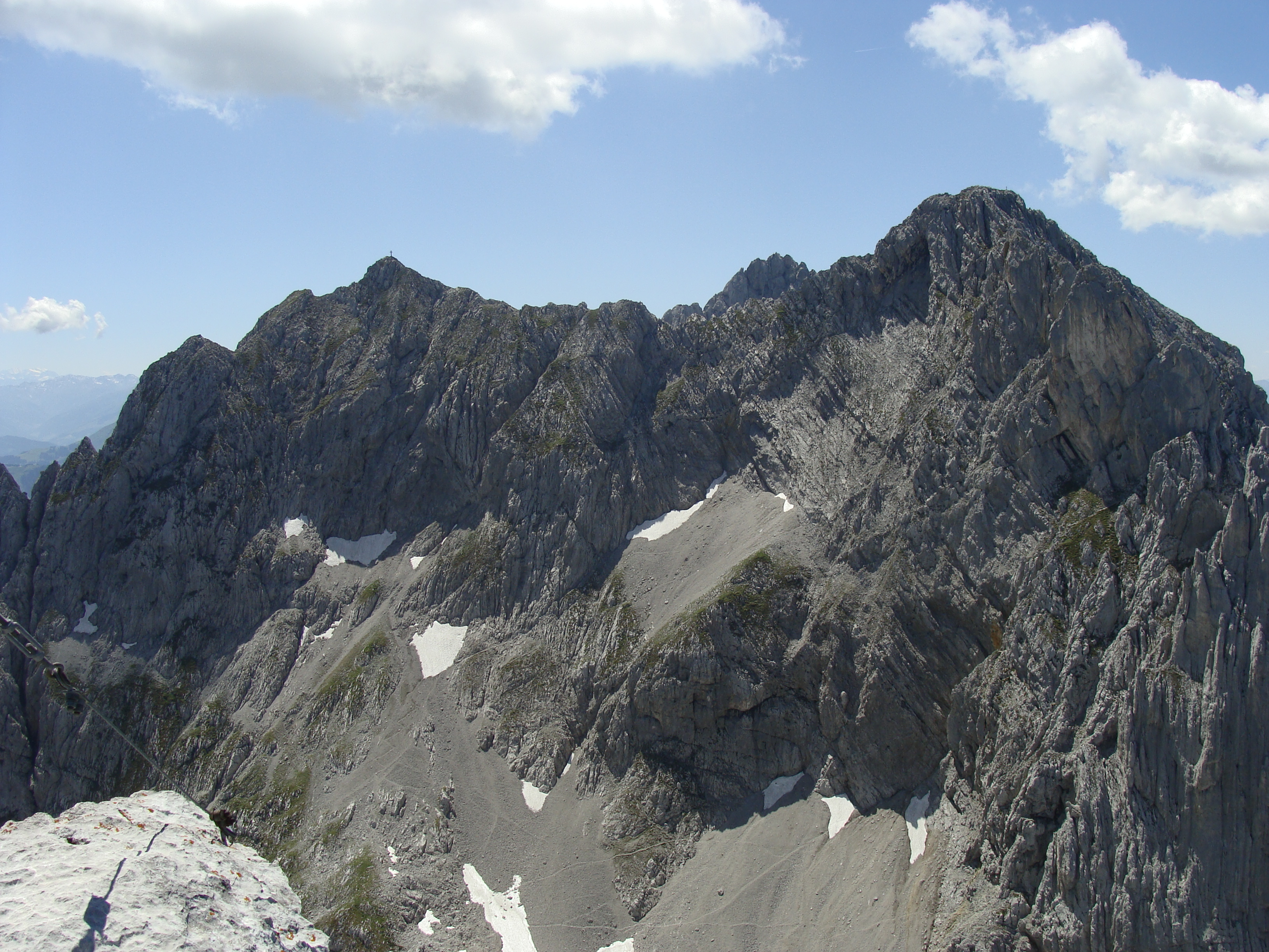 Vordere und Hintere Karlspitze (im Hintergrund Ellmauer Halt) - Blick vom Gipfel der Hinteren Goinger Halt